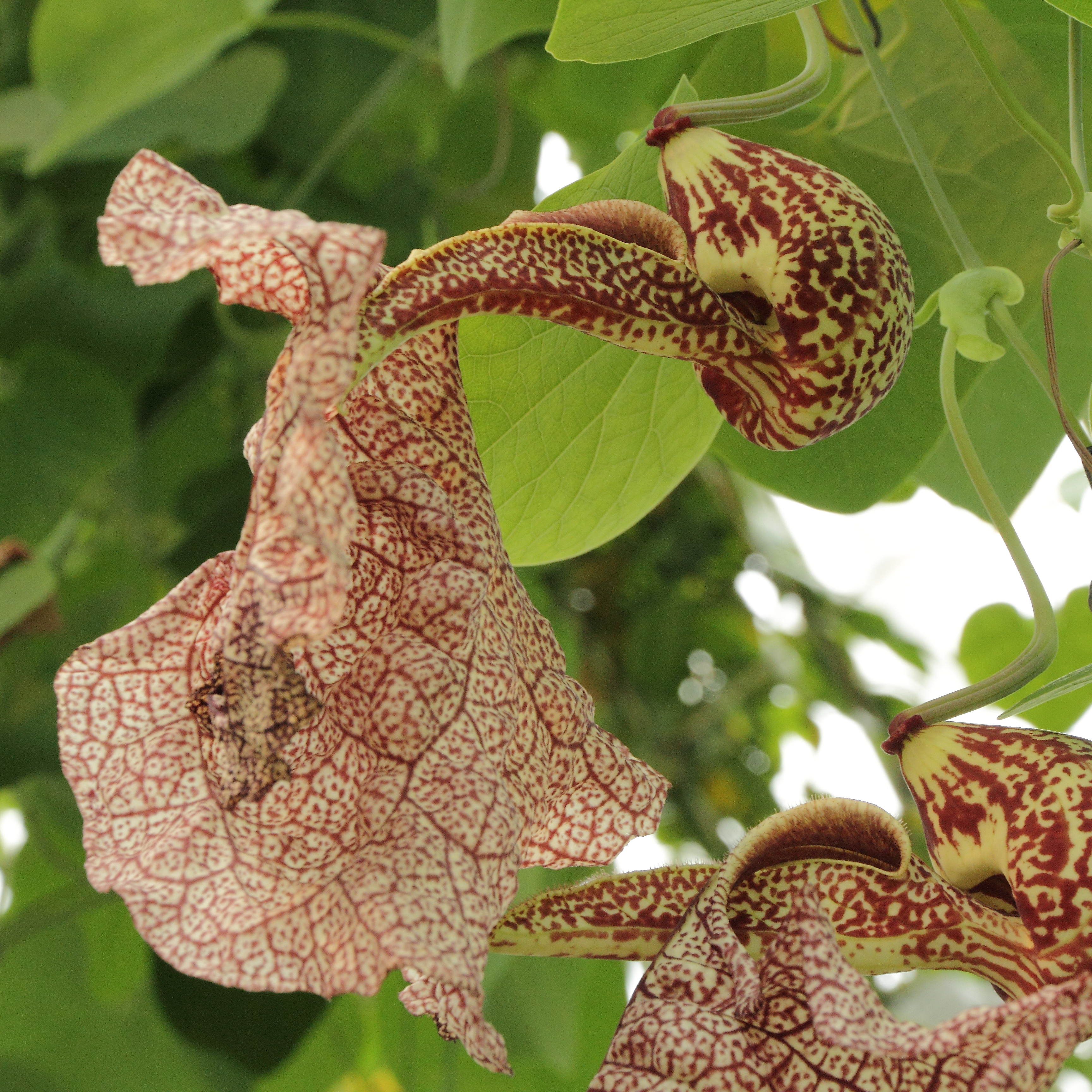 Aristolochia labiata i Bergianska trädgården.